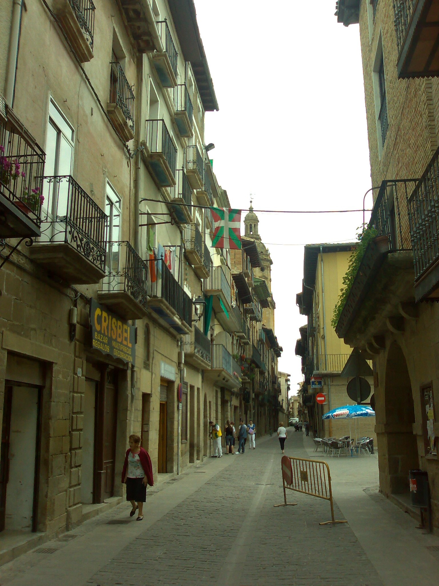 Garesko kale nagusia, ekaineko egun hodeitsu batean.